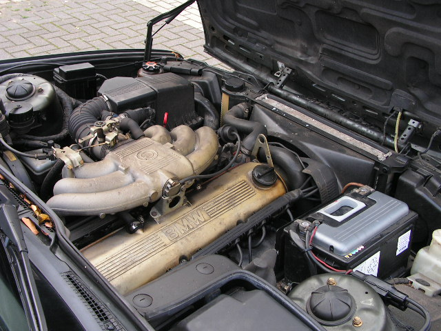 BMW M20 motor in BMW 525i model 1989. Door mijzelf gemaakte foto.